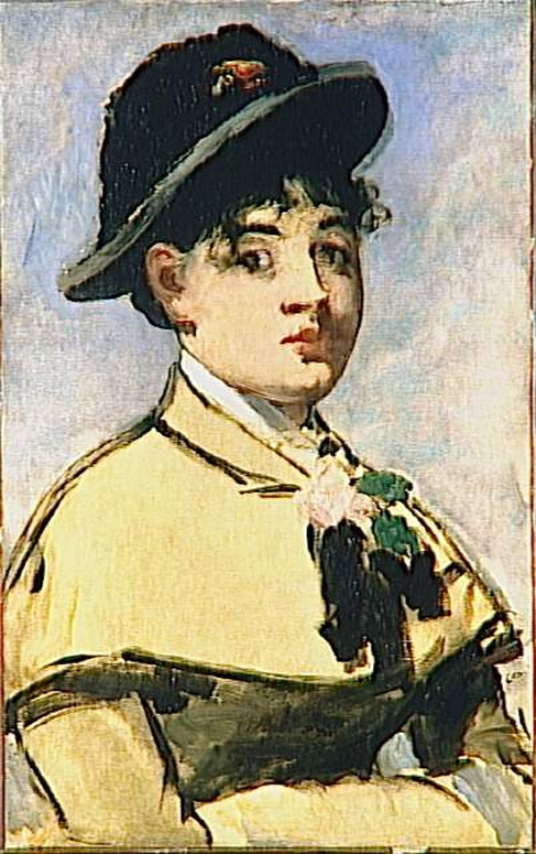 Jeune femme a la pèlerinetitle QS:P1476,fr:"Jeune femme a la pèlerine" label QS:Lfr,"Jeune femme a la pèlerine"